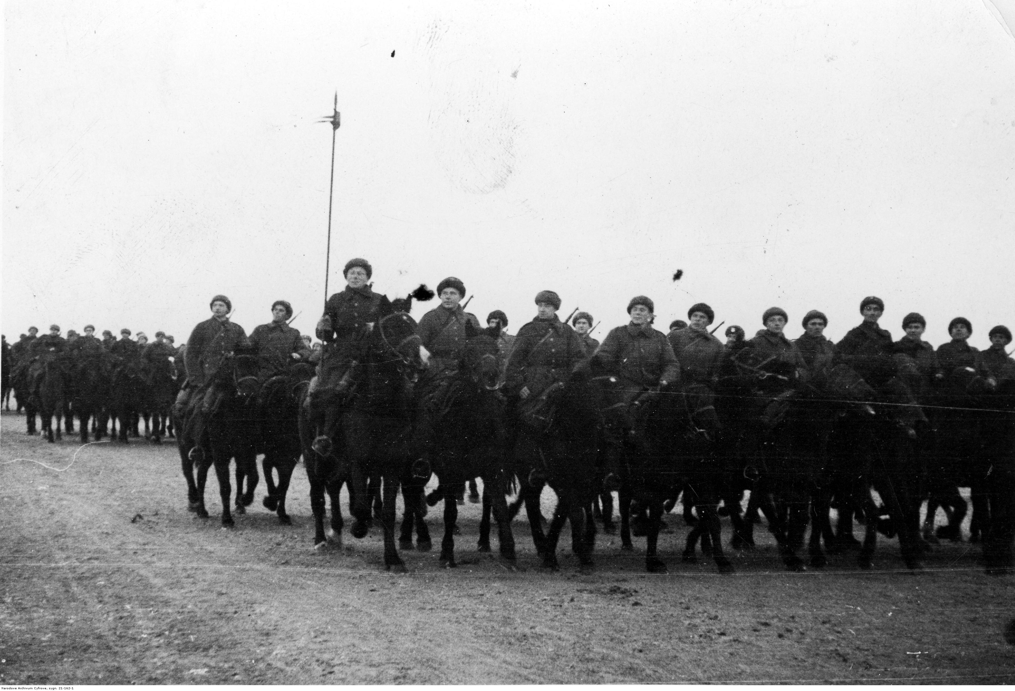 Defilada kawalerii.